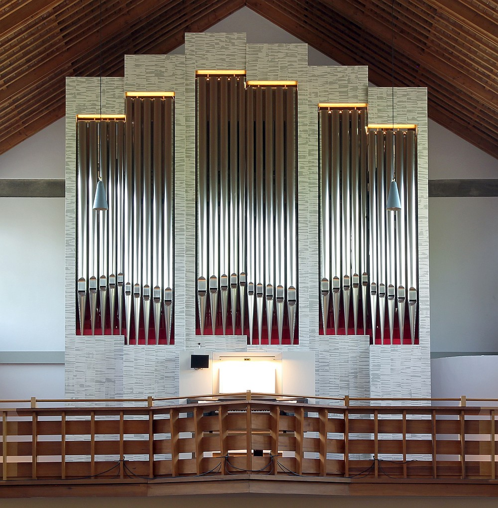 Erscheinungsbild der Winterhalter-Orgel auf der Empore